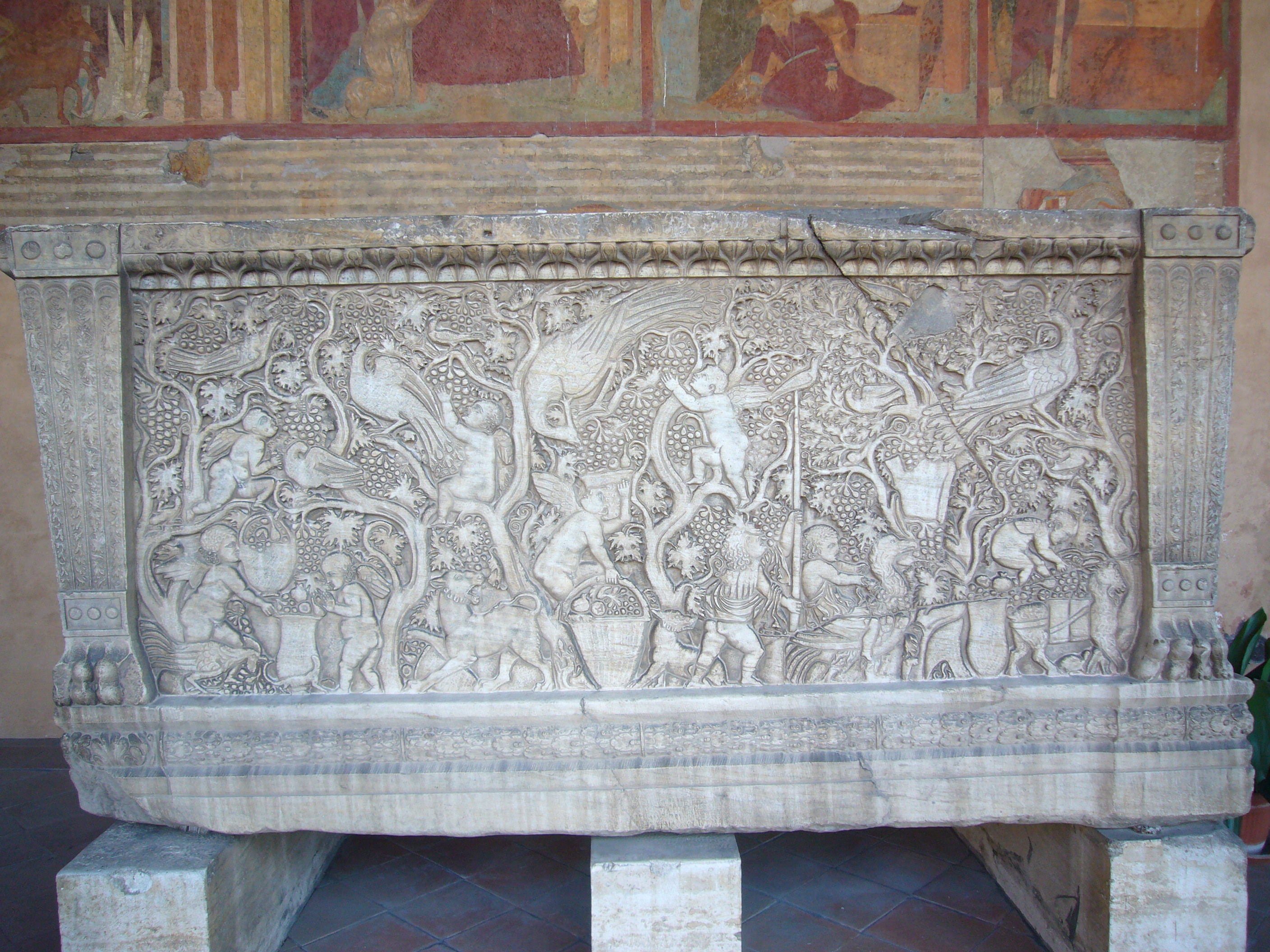 Roma, san Lorenzo fuori le mura. Sarcofago tardoantico nel portico. fianco.